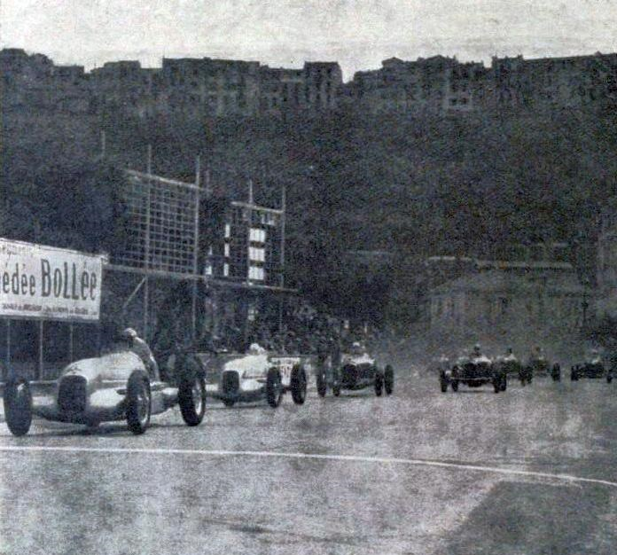 Départ du Grand Prix de Monaco 1935.